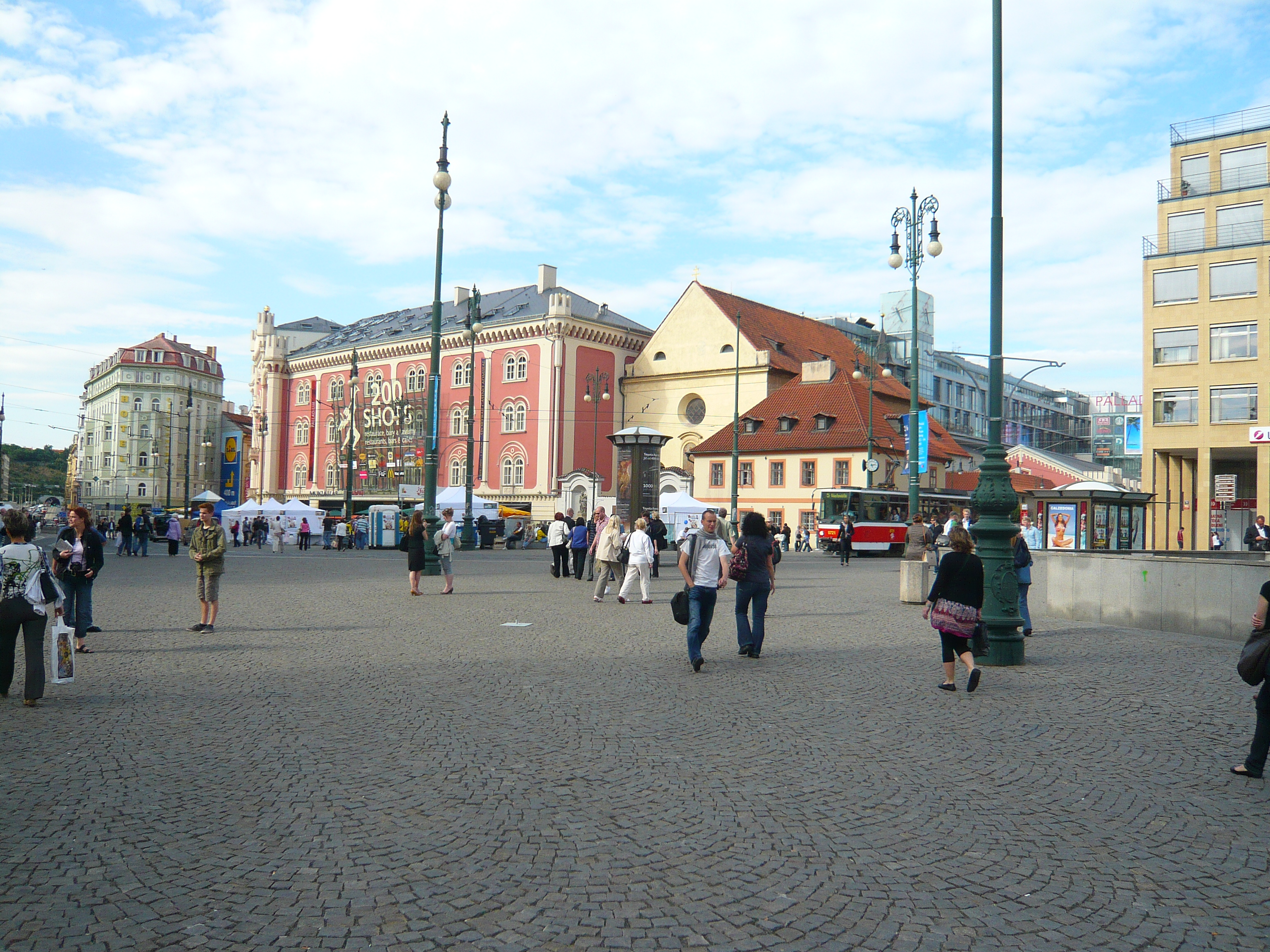 Prag, Platz der Republik